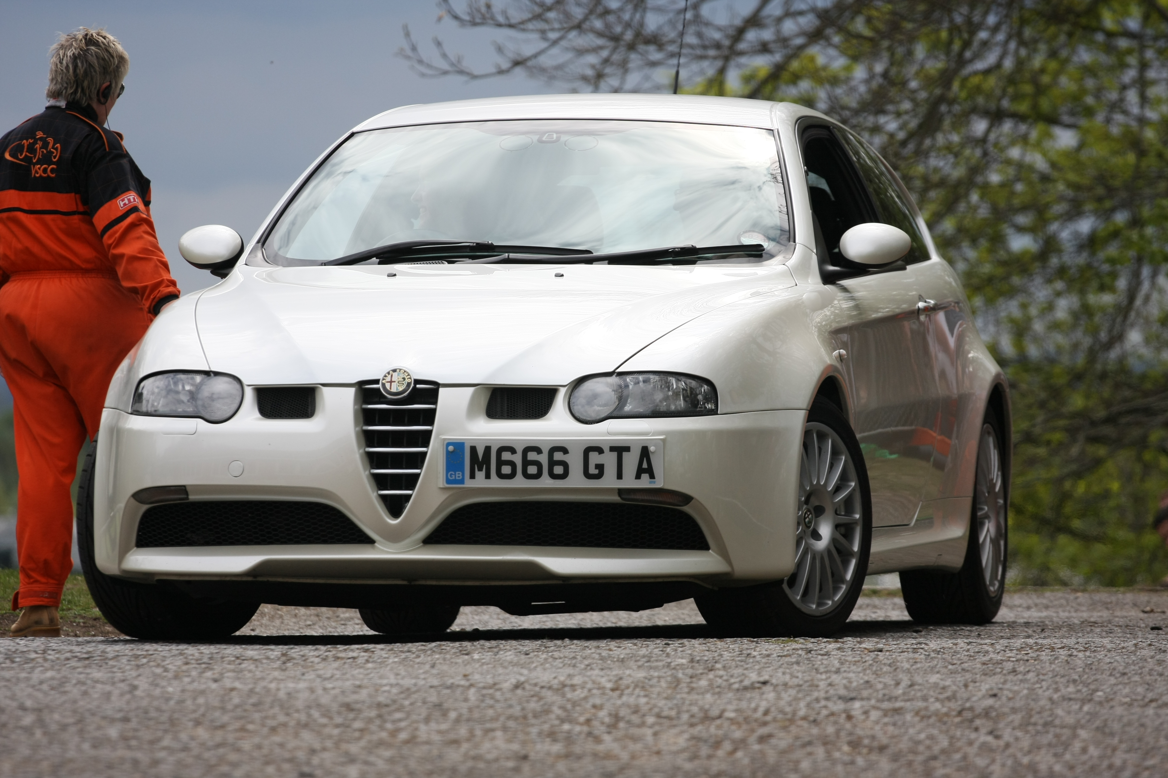 Auto Italia Spring car day Brooklands May 2010